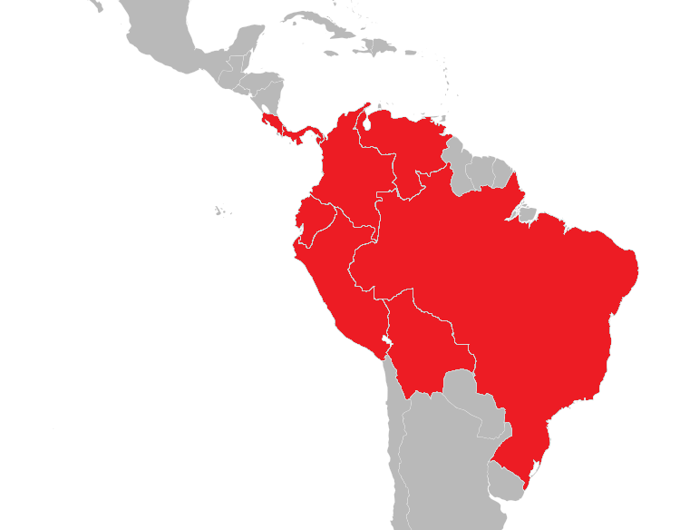 Distribution Gastrotheca- species